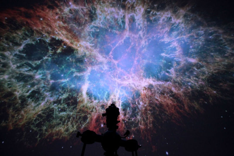 Bild aus dem Planetarium Osnabrück.